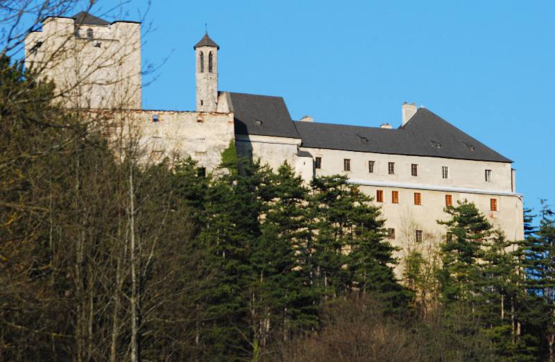 Schloss Stixenstein in Sieding (Ternitz) in Niederösterreich